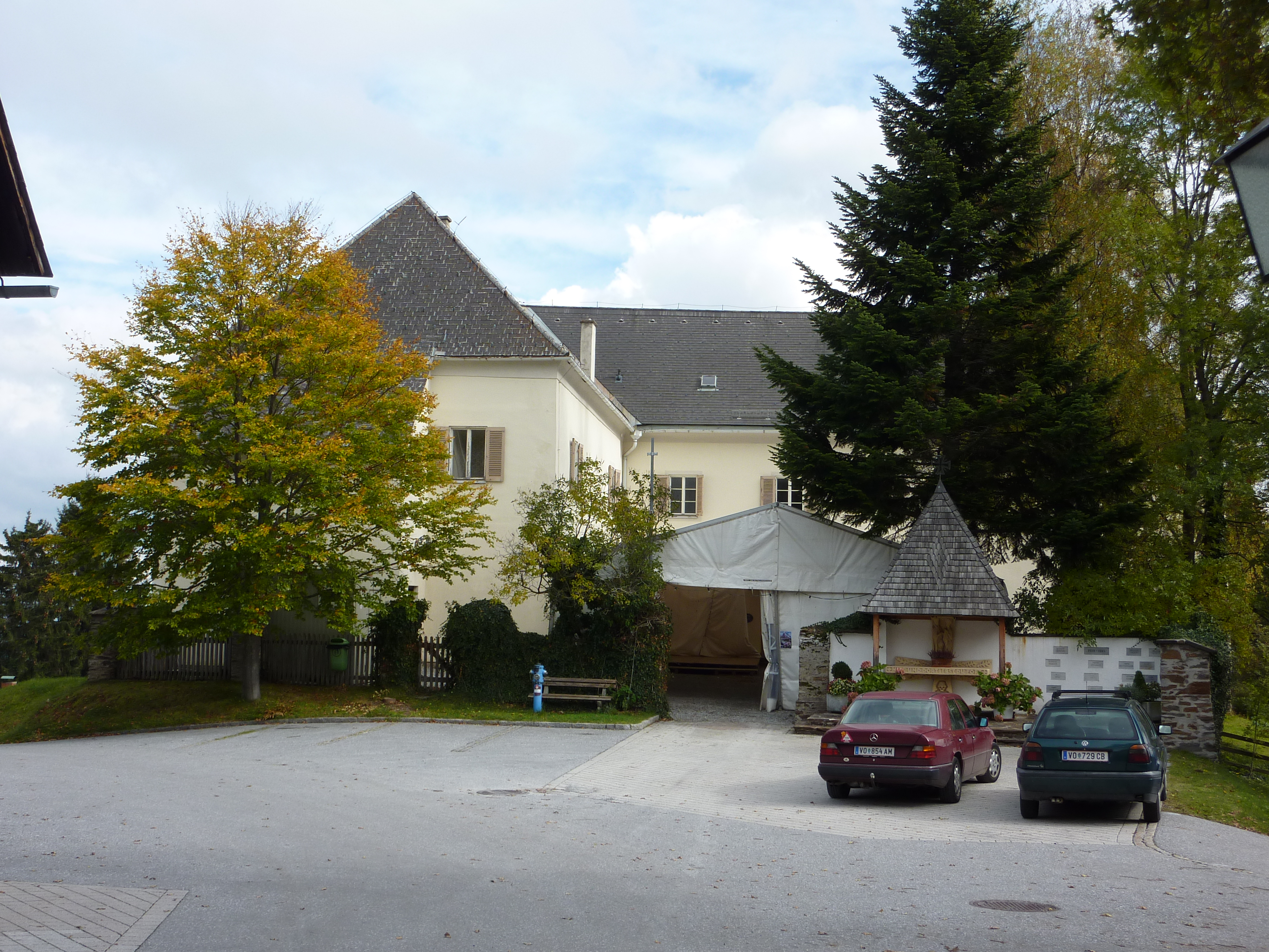 Pfarrhof, ehem. Schloss Rosegg, Pack 39, Steiermark